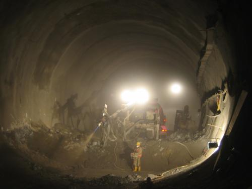 Bauarbeiten im Zuge des Schlossbergtunnel